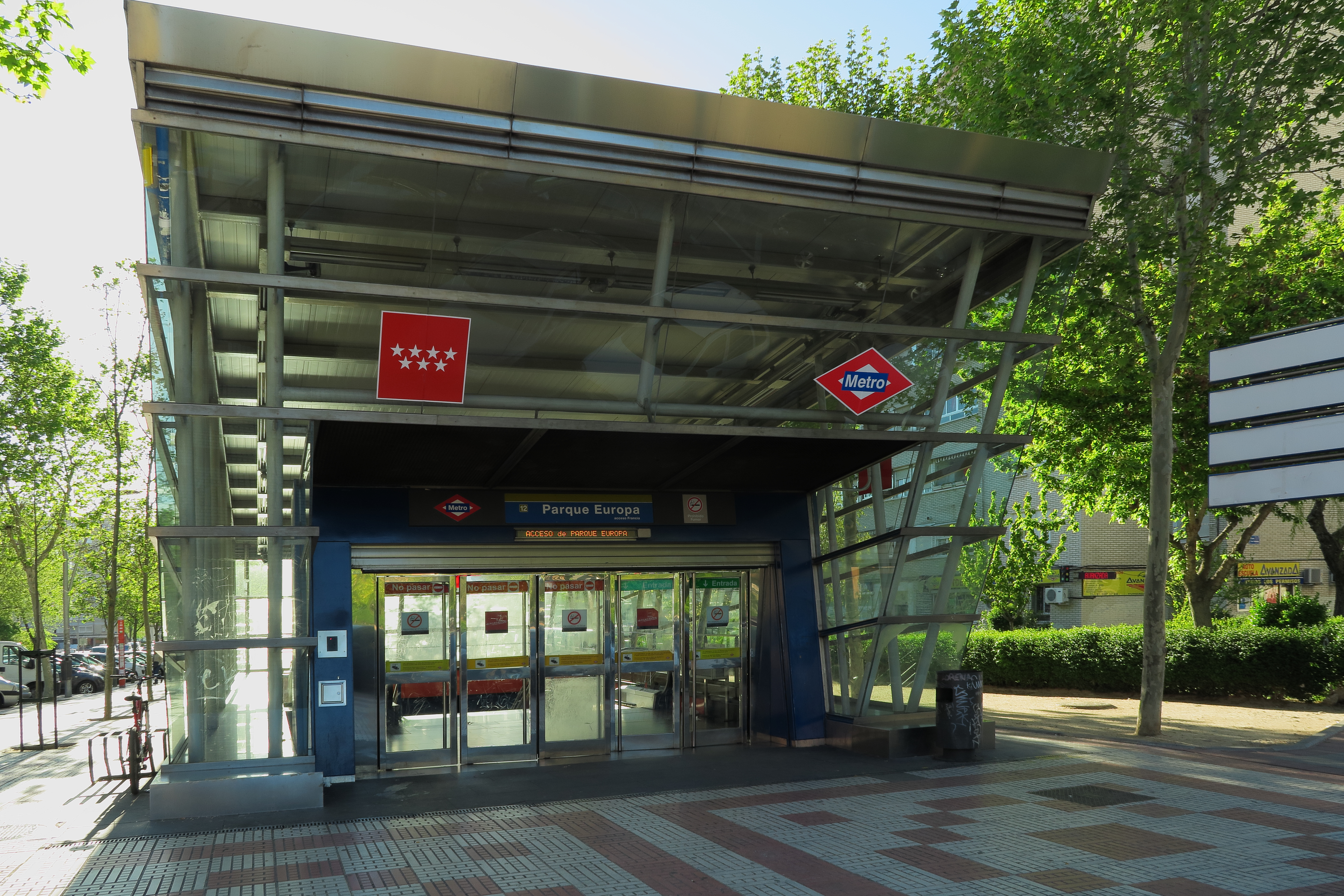 Estación de Parque Europa, acceso Francia